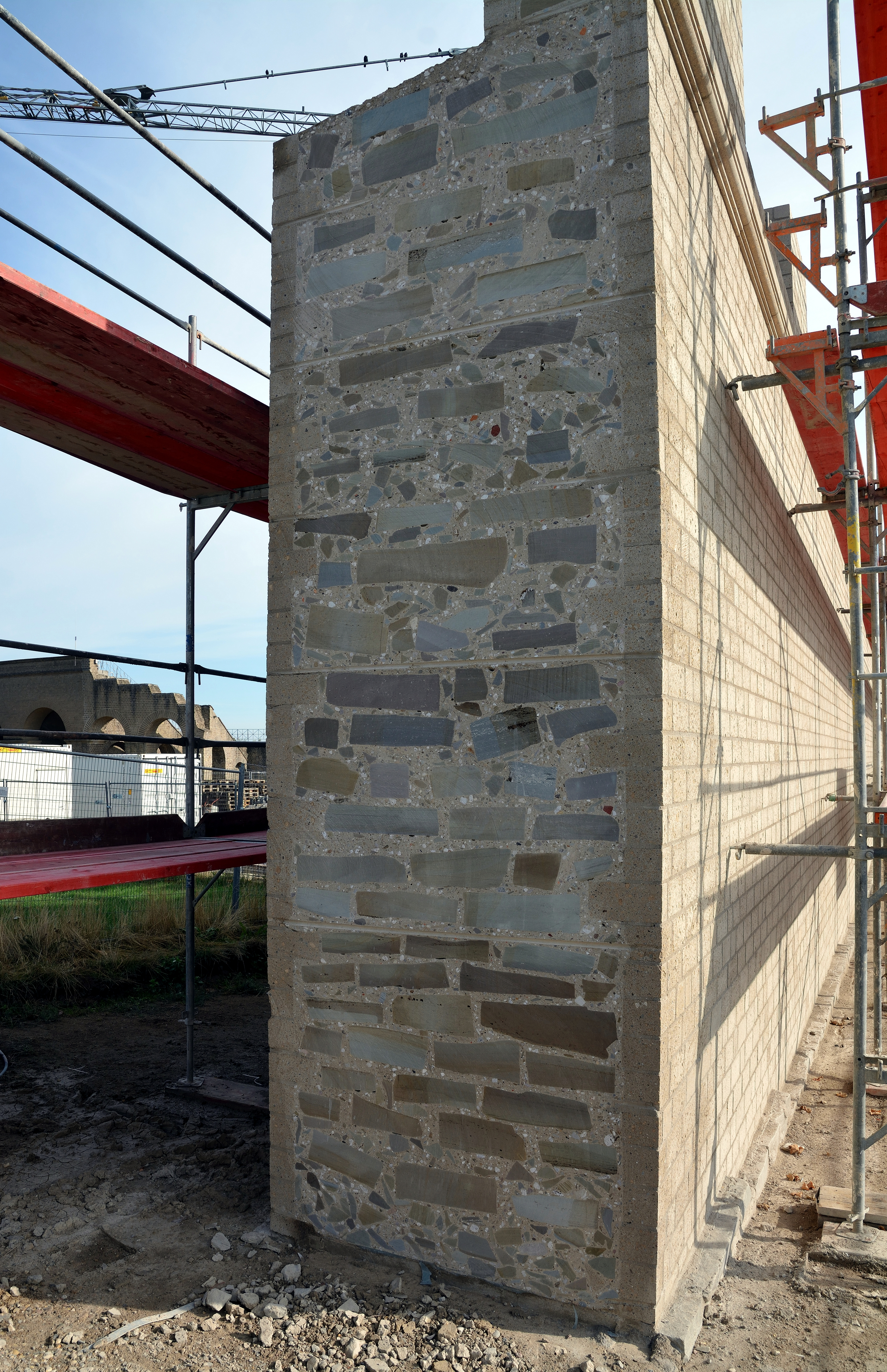 Impressionen aus dem LVR-Archäologischer Park Xanten Hier: Schnitt durch die rekonstruierte Stadtmauer rechts vom Eingangspavillion. Die Bauweise erfolgte genau einer römischen Bauweise: Nach jeweils ungefähr drei Lagen Ziegeln der Verblendung wurde der Innenraum mit Bruchsteinen und Kalkzement aufgefüllt. Je nach Verfügbarkeit sind die Verfüllungen unterschiedlich: Es wechseln sich Schichten von groben Steinen und Flusskieseln ab.